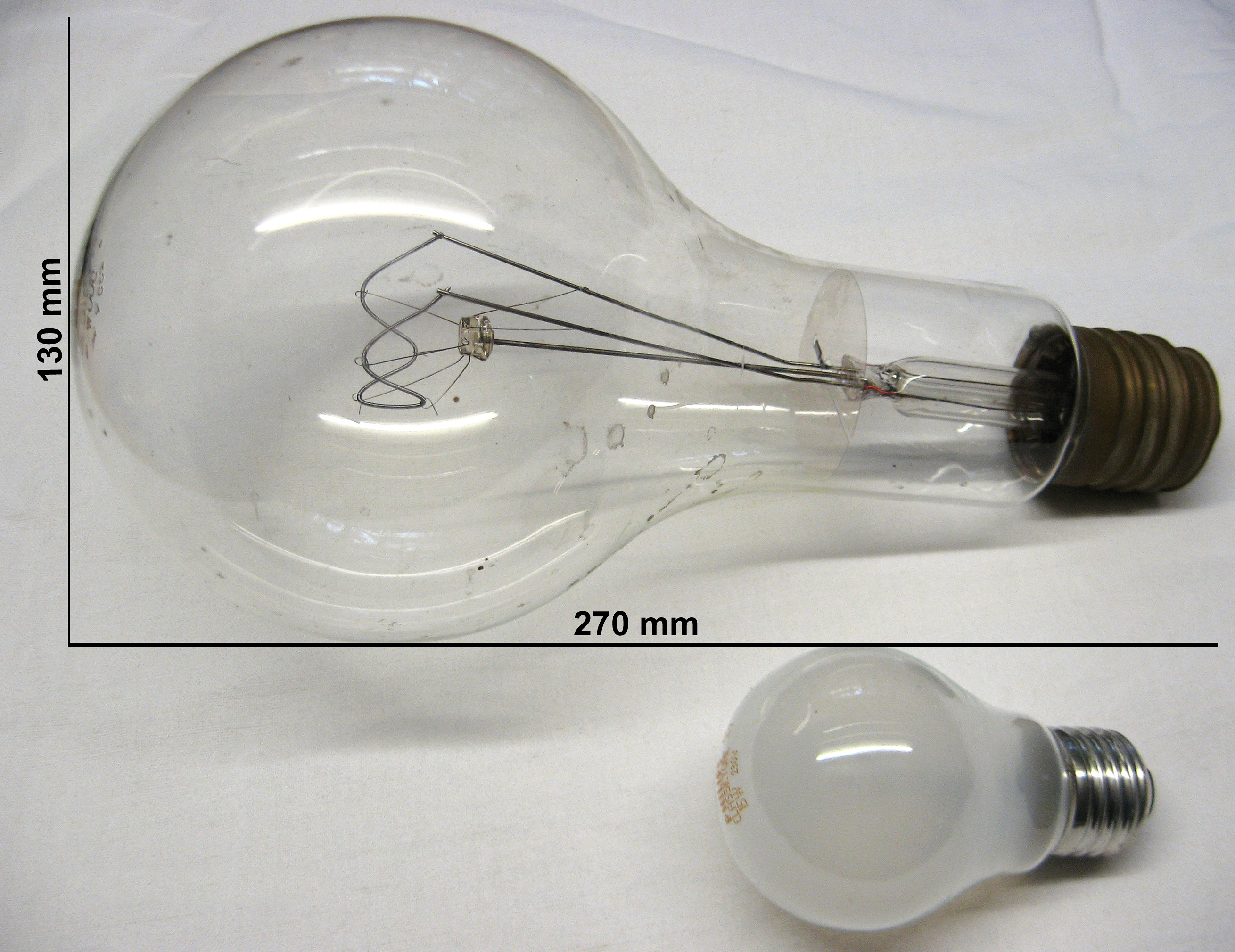 Glühbirne E40 (500 Watt, klar, 235 Volt) und E27 (15 Watt, matt, 235 Volt). Gebrauchte Osram-Glühbirne aus einer Werkstatt, Standzeit ca. 5 Jahre, funktionsfähig. Kleine Glühbirne zum Vergleich.